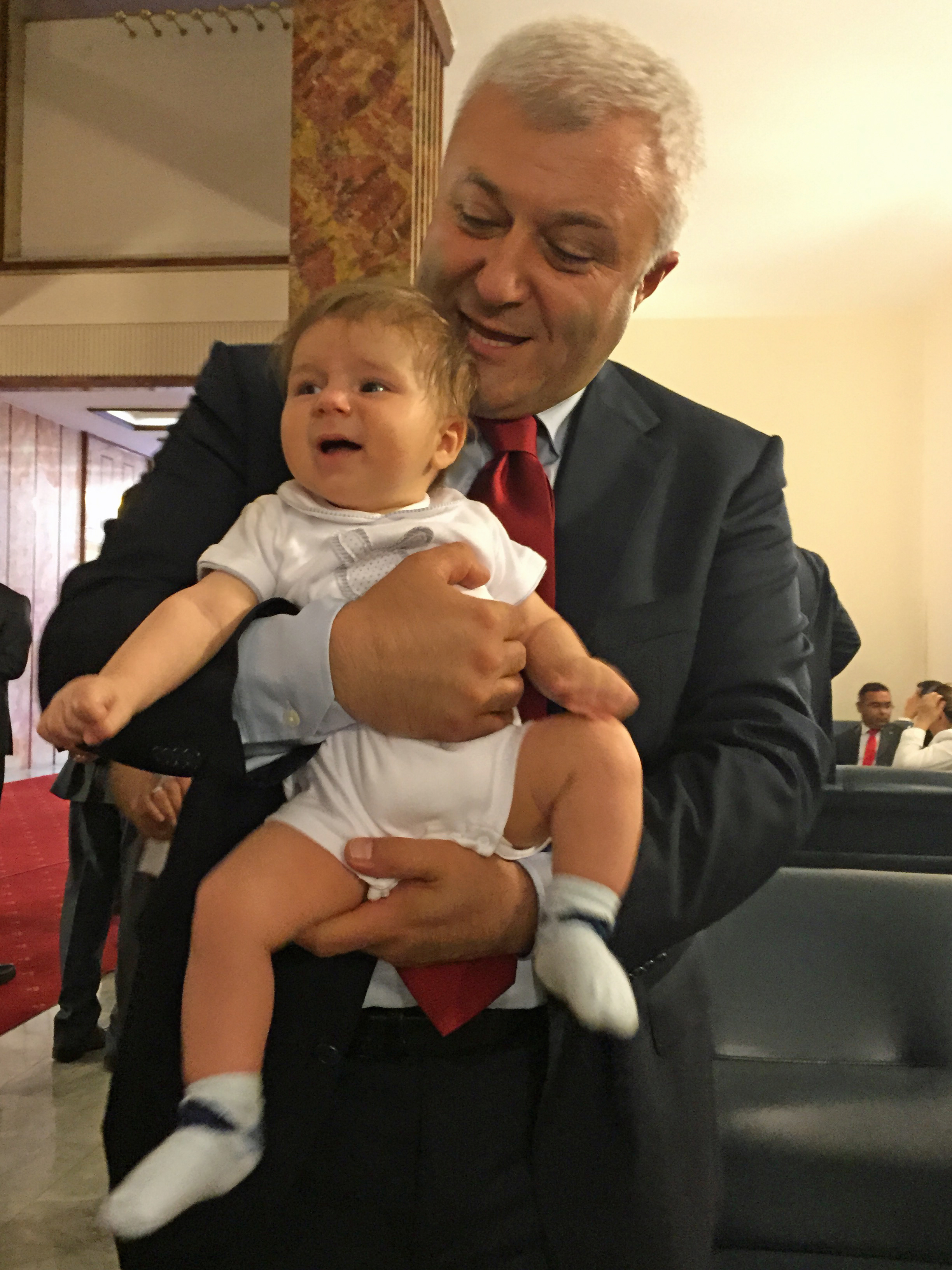 Tuncay Özkan Türkiye Büyük Millet Meclisi 23 June 2015